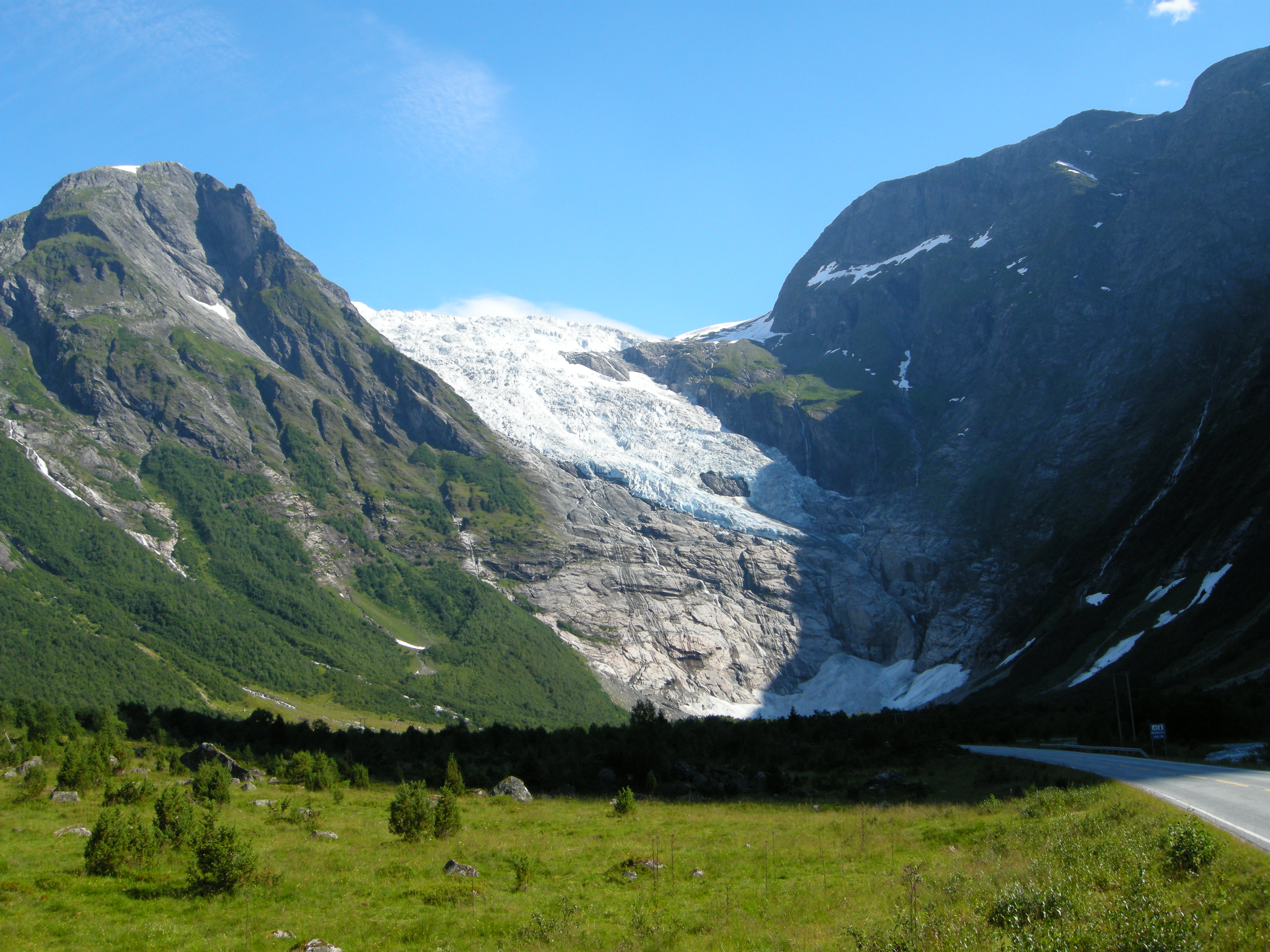 Bøyabreen sett fra veien